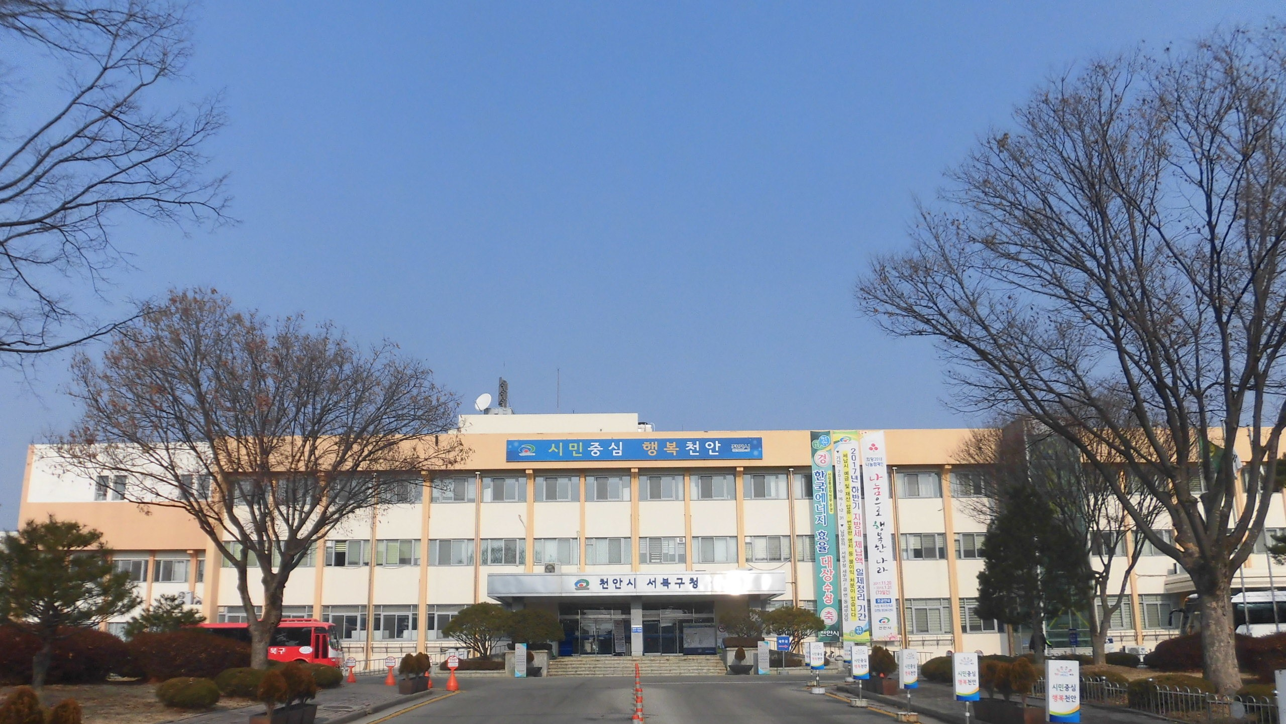 충청남도 천안시에 있는 서북구청